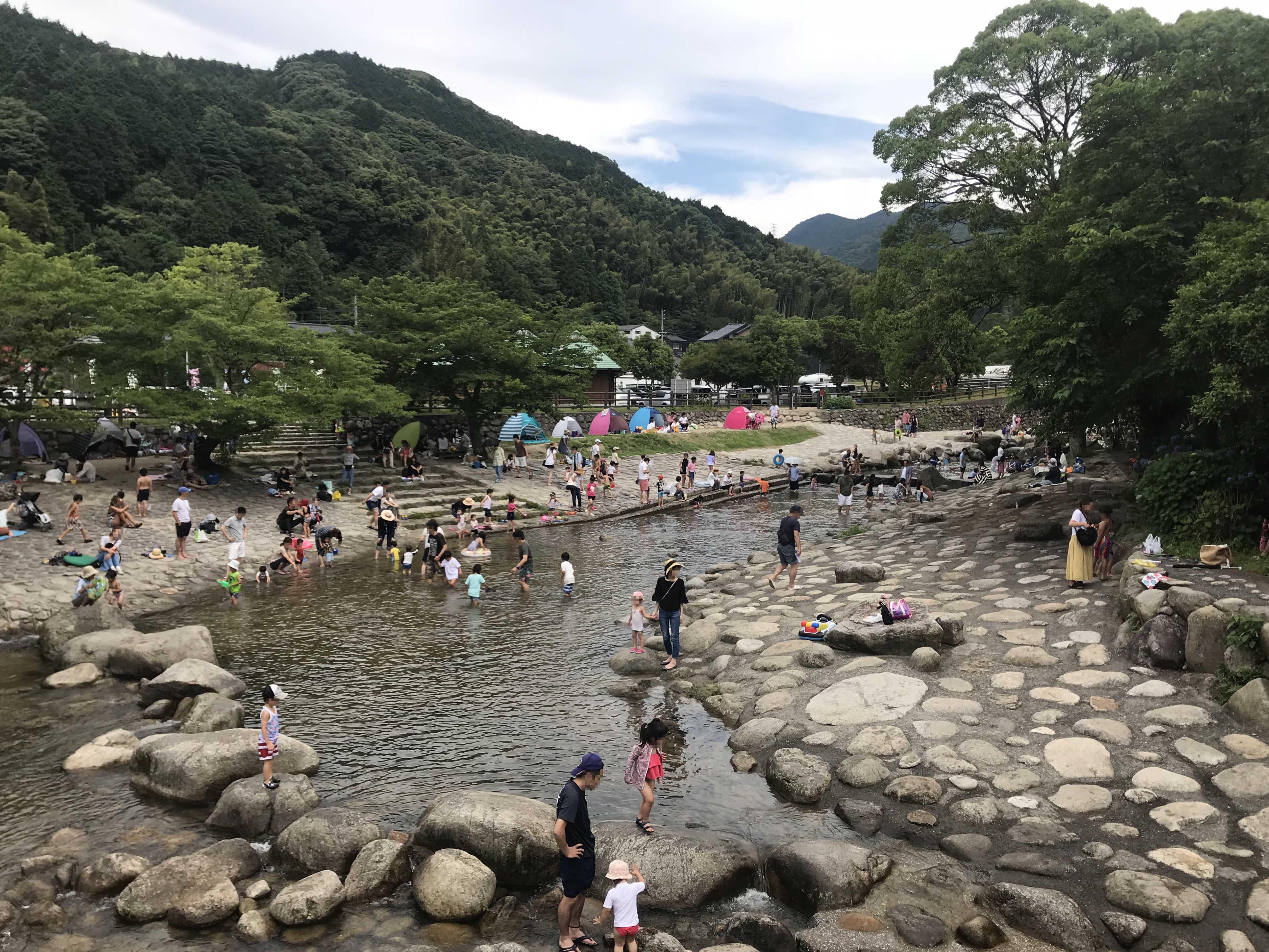 四季彩橋より望む中ノ島公園のじゃぶじゃぶ河原